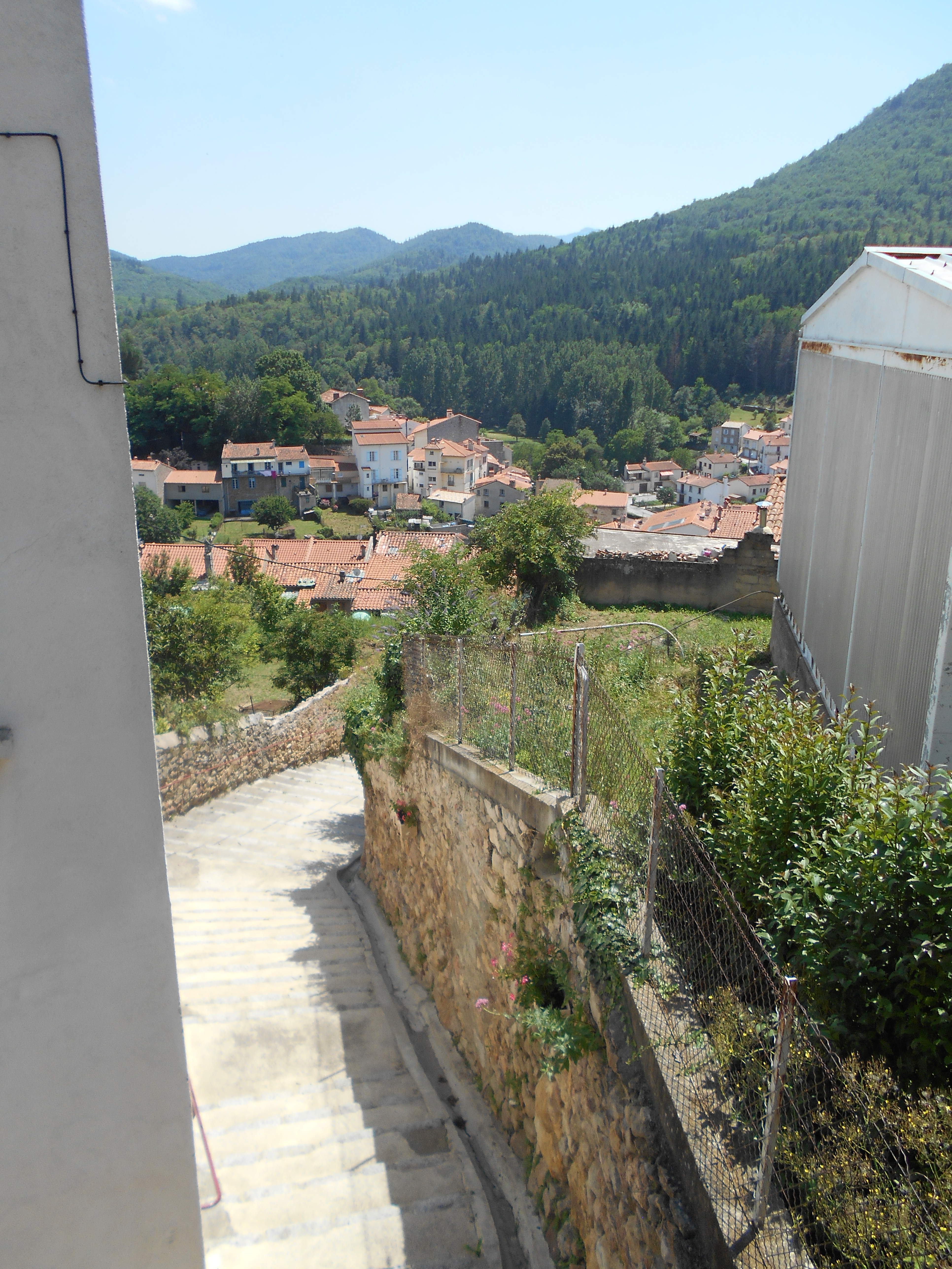 Veînat del Molí de Sant Llorenç de Cerdans